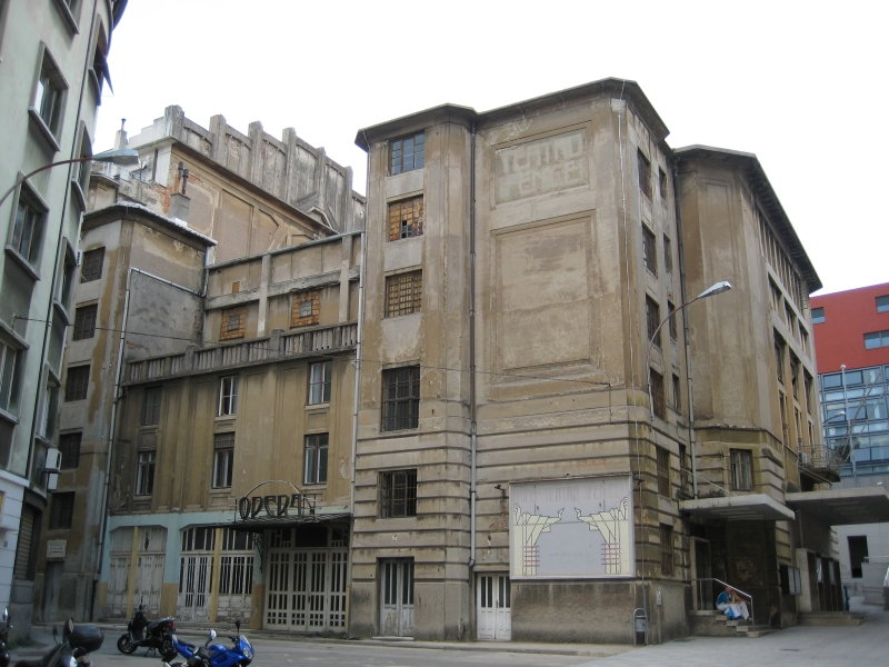 Teatro Fenice, otvoreno 2. svibnja 1914. godine, Rijeka. Croatia